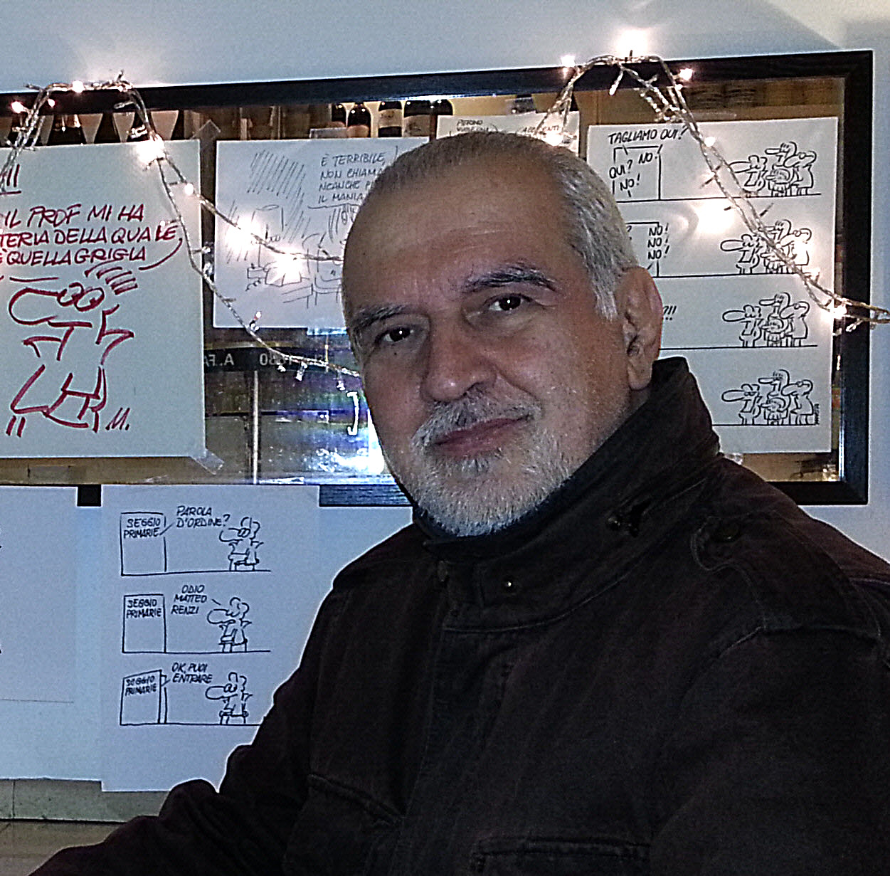 Esposizione vignette al bar "Fassino"- Roma - 2013